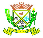 Brasão de Pontes e Lacerda